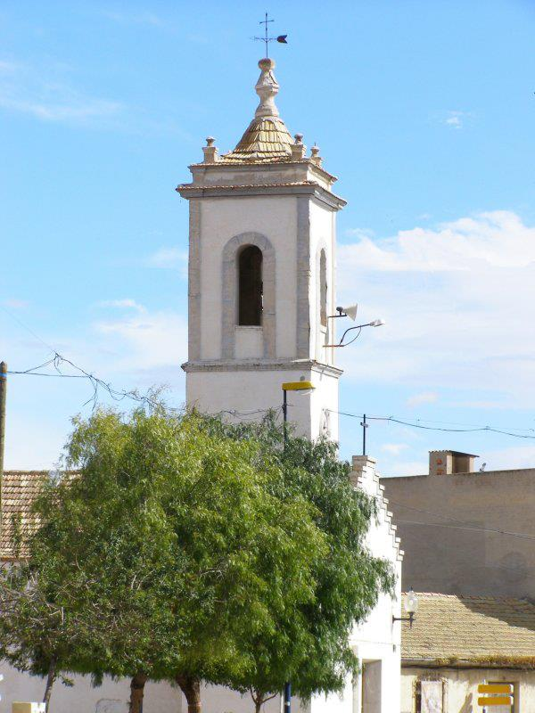 Campanario iglesia parroquial